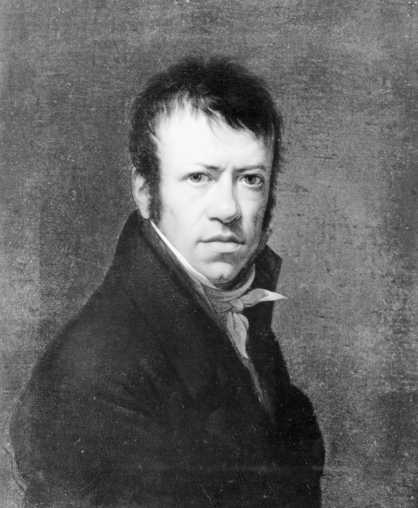 Selbstbildnis Johann Baptist Seeles